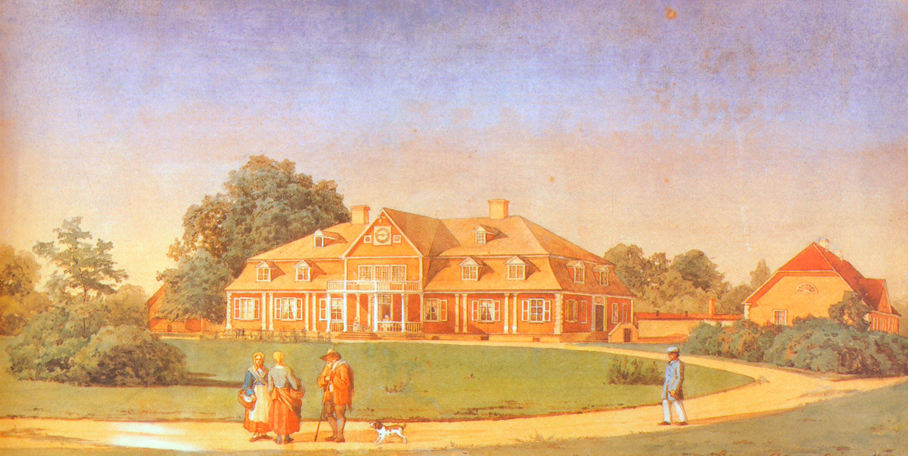 Das Herrenhaus Orellen in Livland, heute Ungurmuiža, Bezirk Pārgauja in Lettland, Gemälde von Eugen Dücker, 1862 Datum: 1862 Urheber: Eugen Dücker Quelle: "Gutshof unter den Eichen", Katalog der Ausstellung im Schlossmuseum Rundale und im Herder-Institut Marburg, 1998